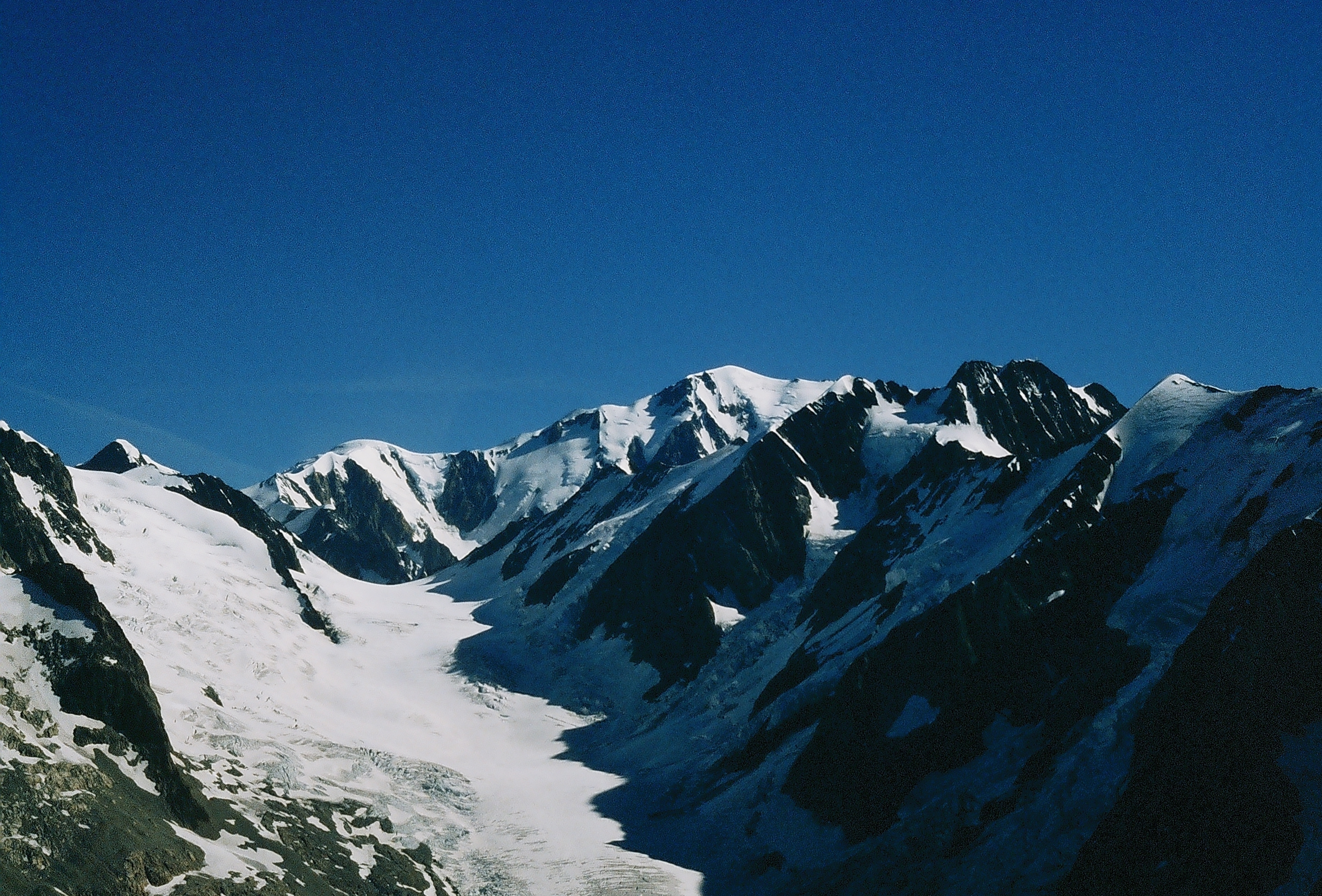 de gauche à droite : Dome du Goûter, Mont Blanc, Tré-la-Tête. Devant : col Infranchissable et glacier de Tré-la-Tête.